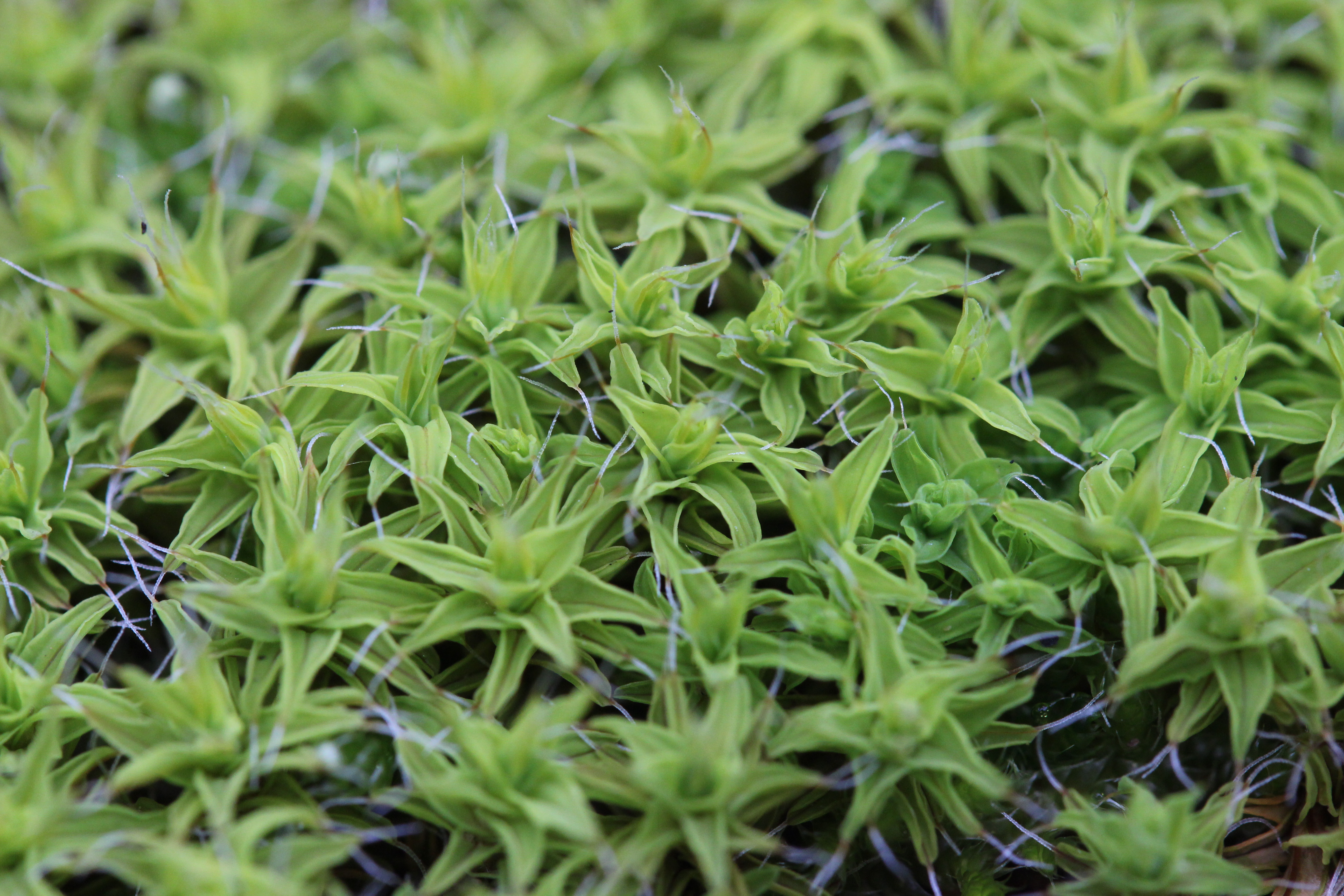 Star Moss - Tortula ruralis